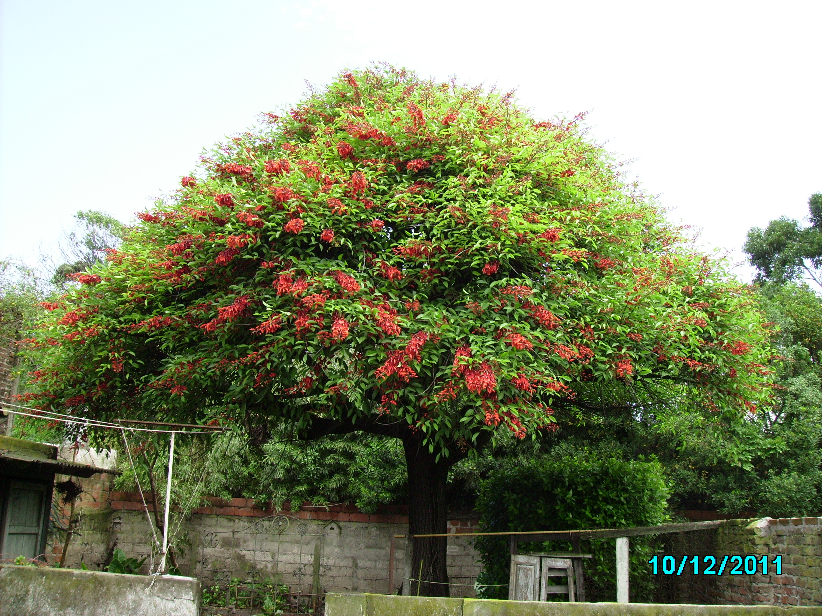 Árbol de Ceibo de aproximadamente 50 años